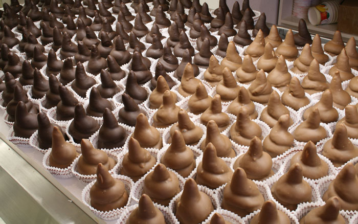 Meßkircher Katzendreck®, regionale Fasnachtsspezialität Café Konditorei Brecht, Meßkirch